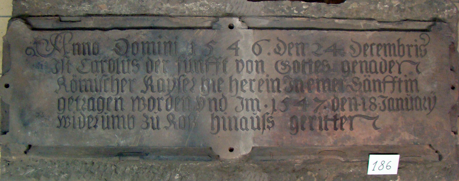 Alter Inschriftenstein vom Schöntaler Hof in Heilbronn, jetzt verwahrt im Heilbronner Lapidarium